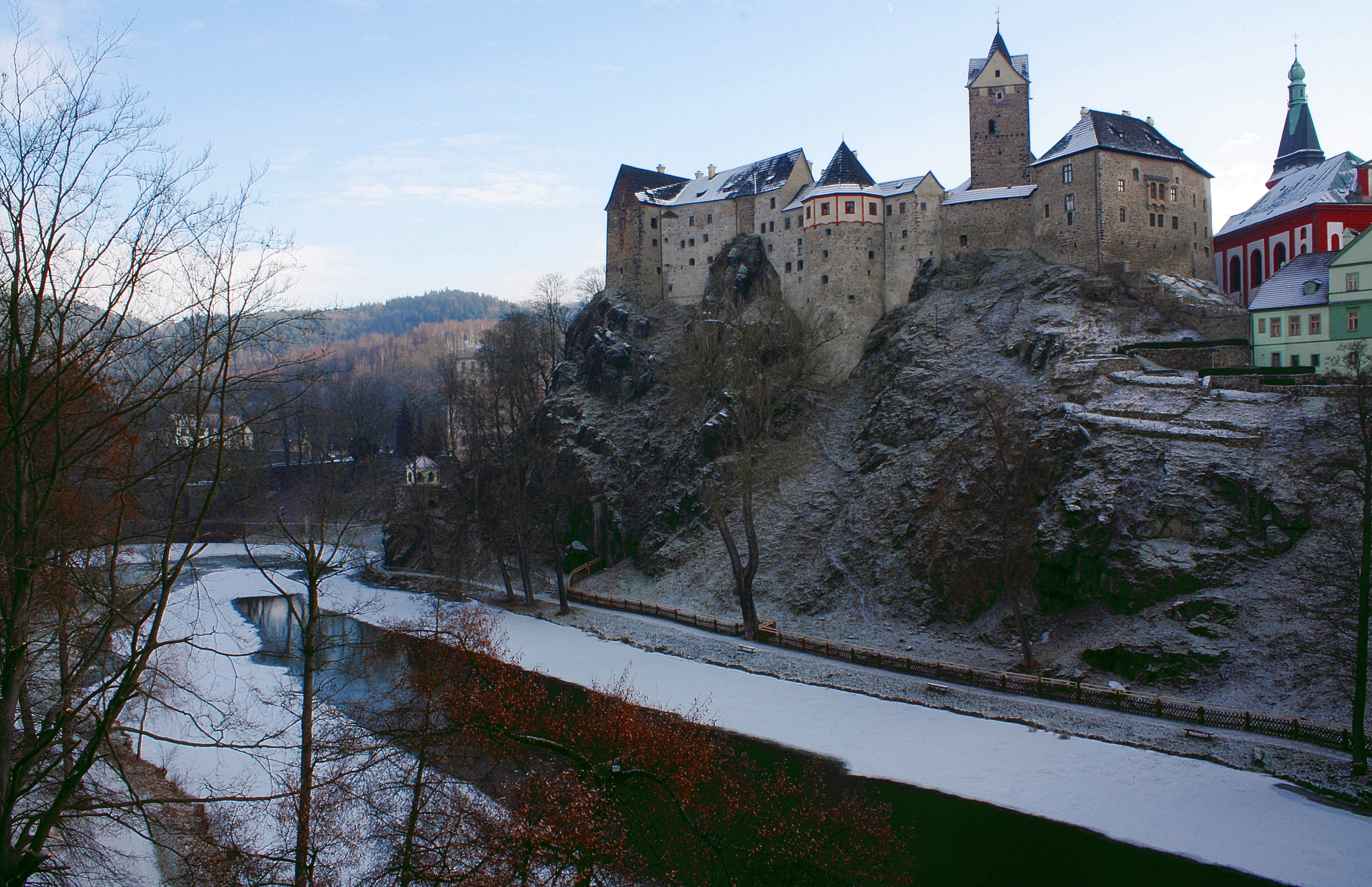 Hrad Loket / Burg Neudek in Elbogen (Winteransicht)